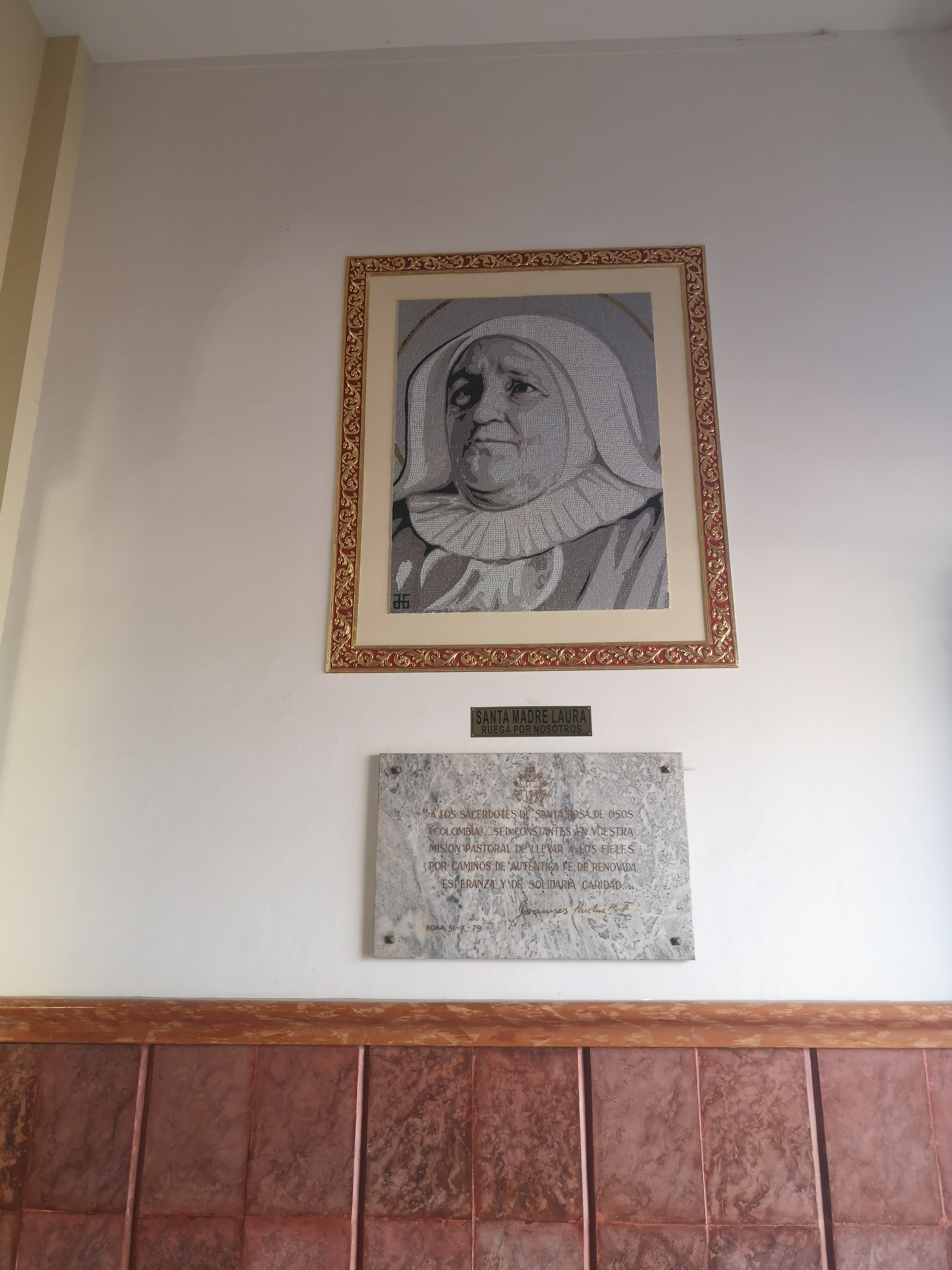 Catedral de Santa Rosa de Osos